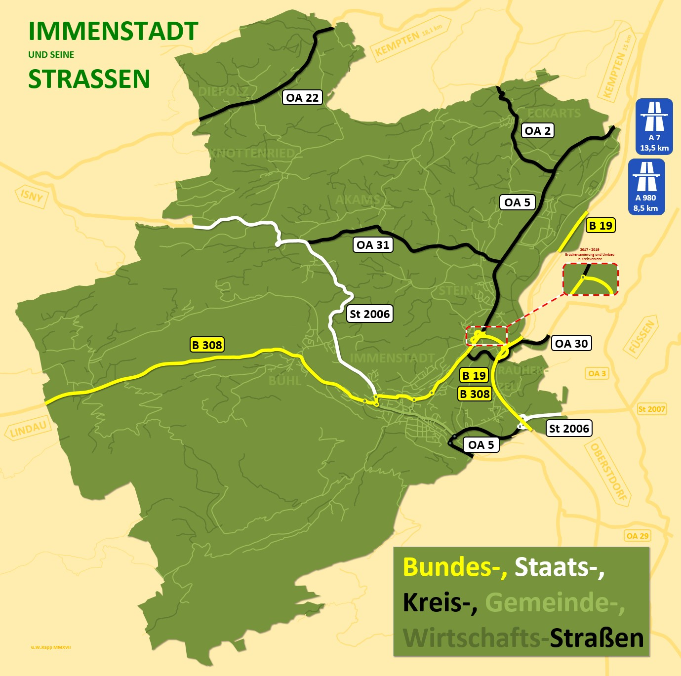 Bundes-, Staats-, Kreis-, Gemeindestrassen und Wirtschaftswege im Gemeindegebiet von Immenstadt